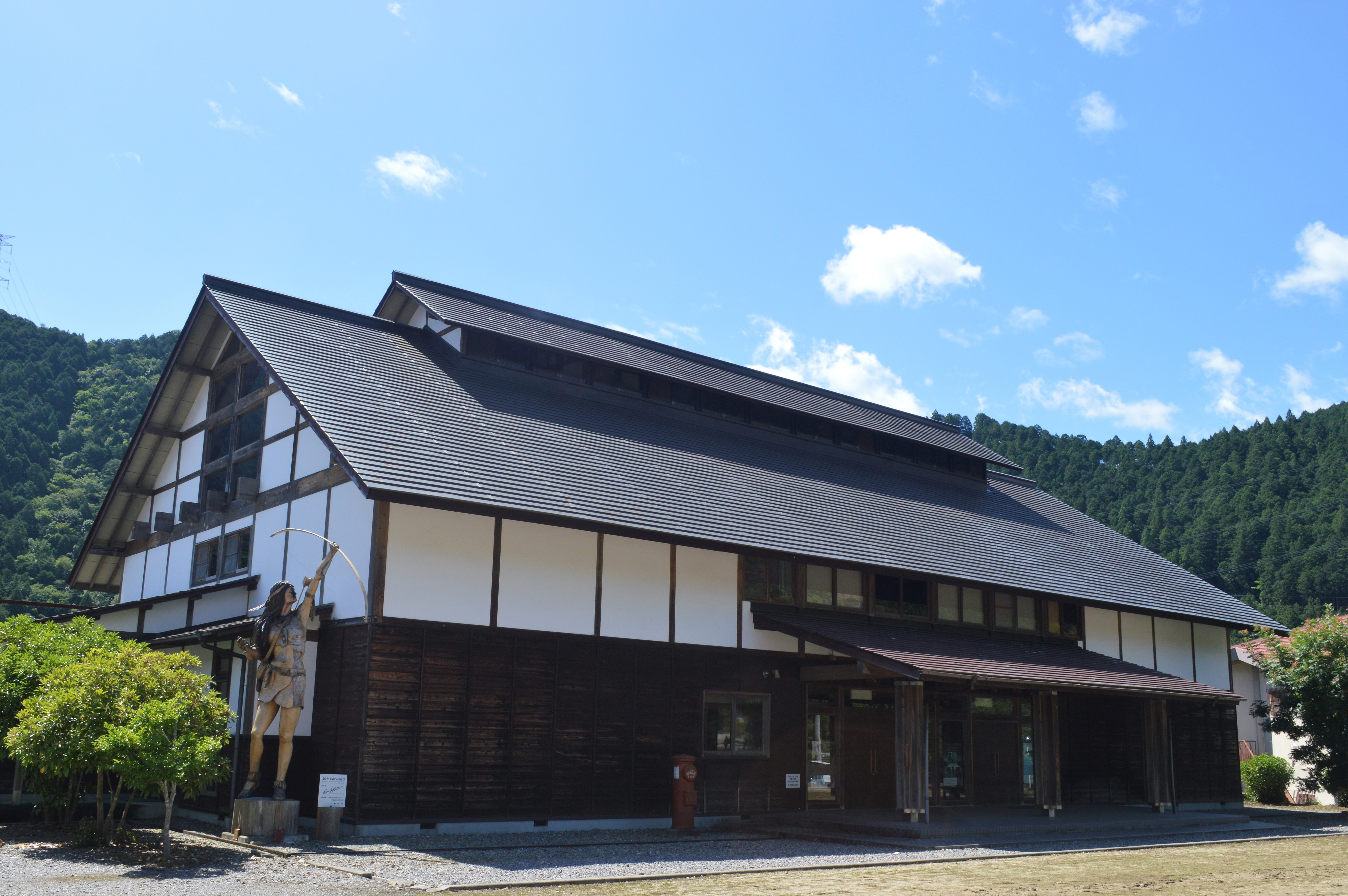 愛知県北設楽郡東栄町の東栄町民芸館。